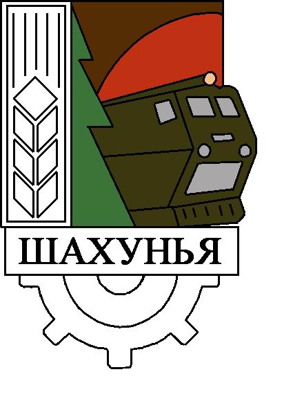 герб города Шахунья